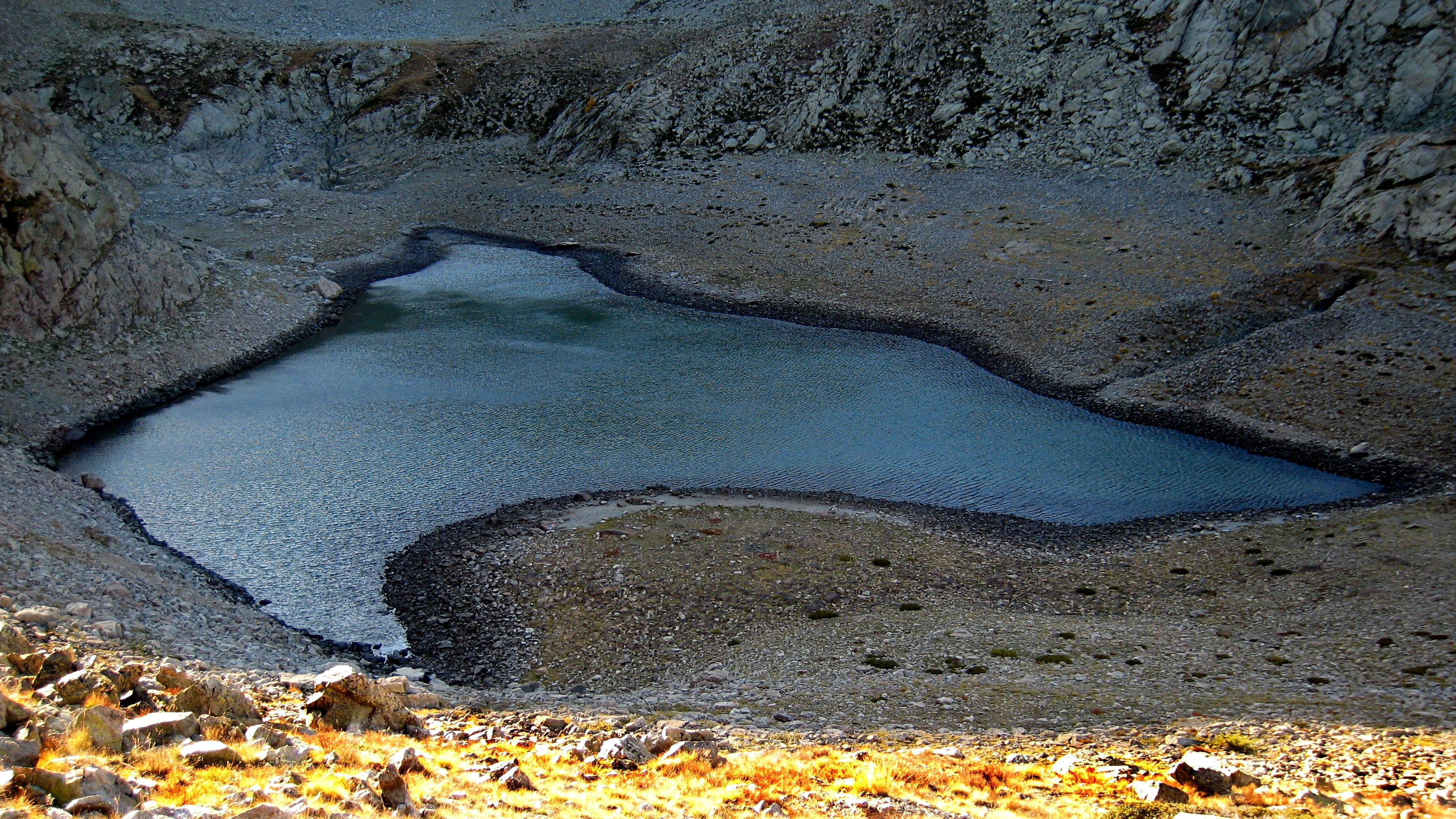 lac de millefonts, commune de Valdeblore, Alpes Maritimes